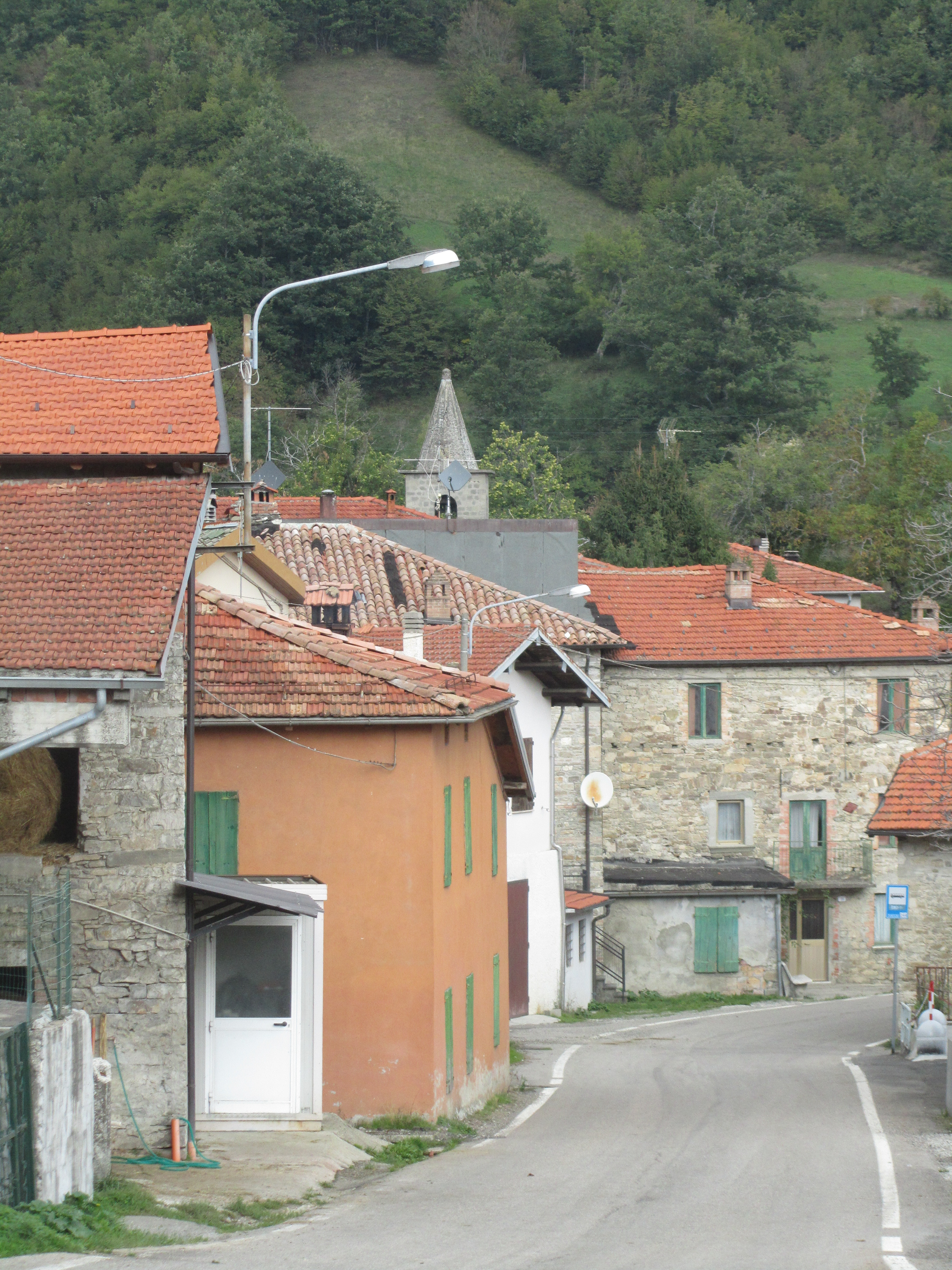 Scorcio di Valcieca, provincia di Parma.